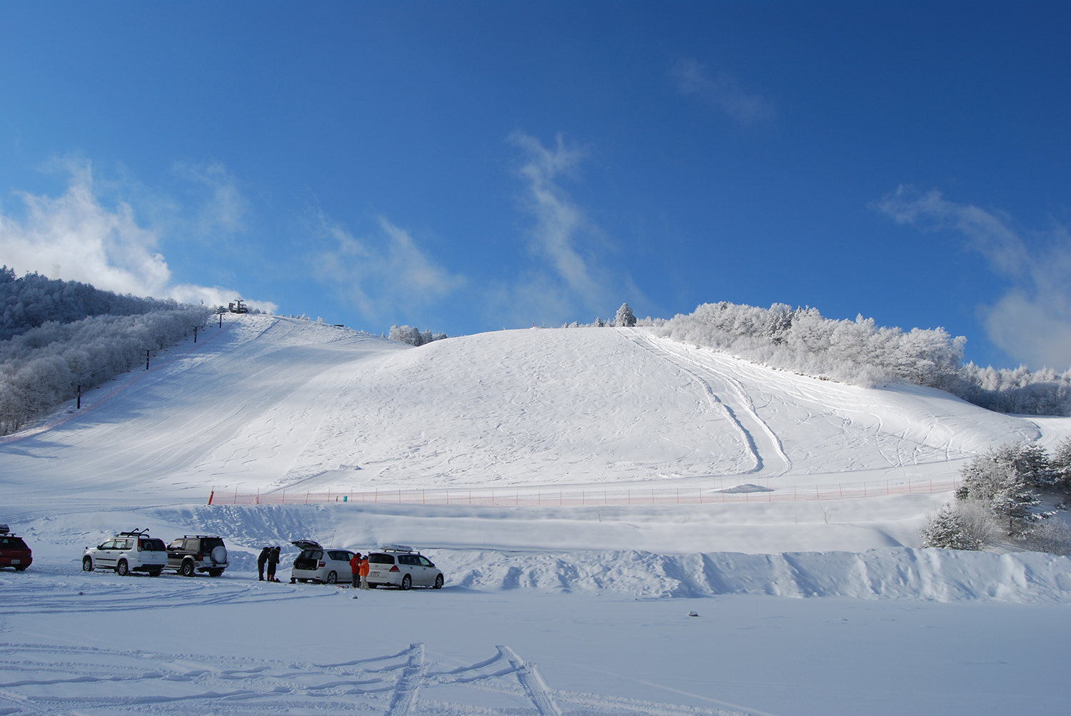 kent